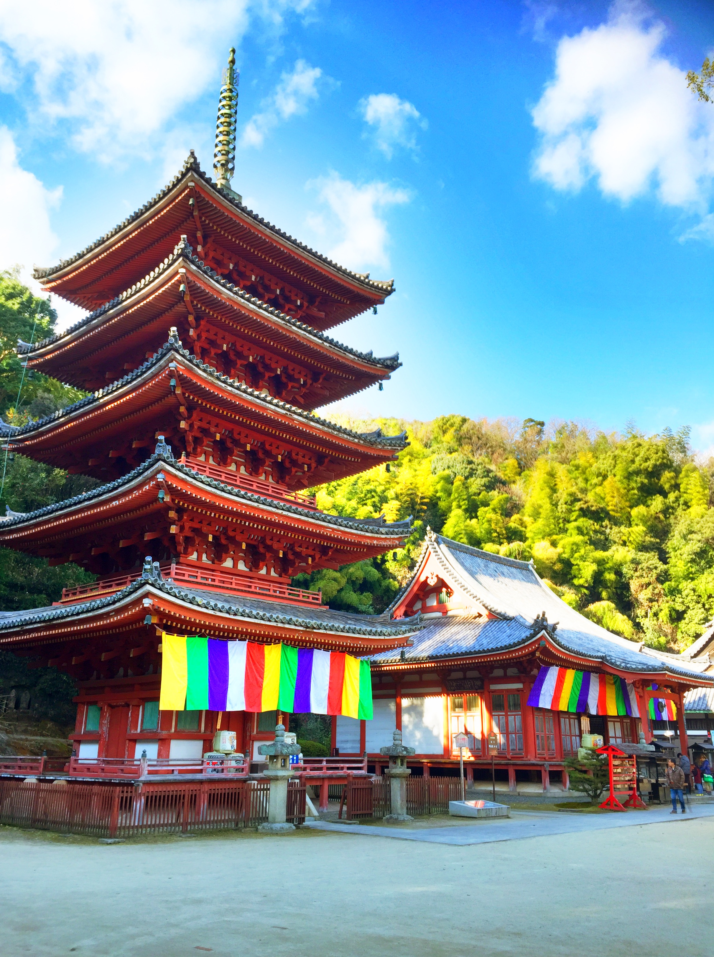 福山市の明王院 5重の塔と本堂(奥）